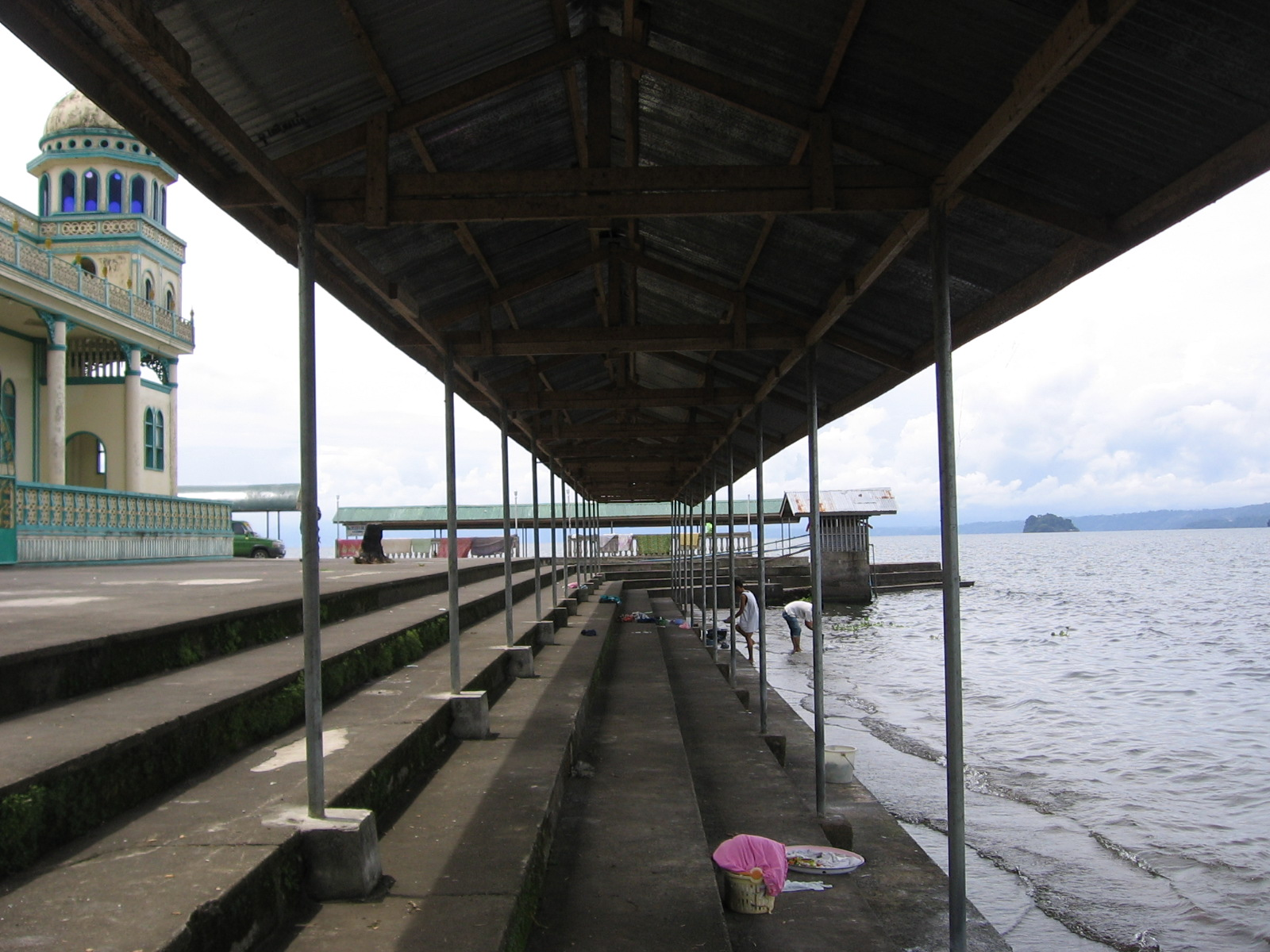 Masjid Bacolod, Bacolod-Kalawi, Lanao del Sur, Philippines.